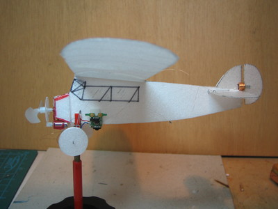 Renard R17, d'après un plan "cacahuete" de B.DELHALLE, envergure 20cm, poids 4g.